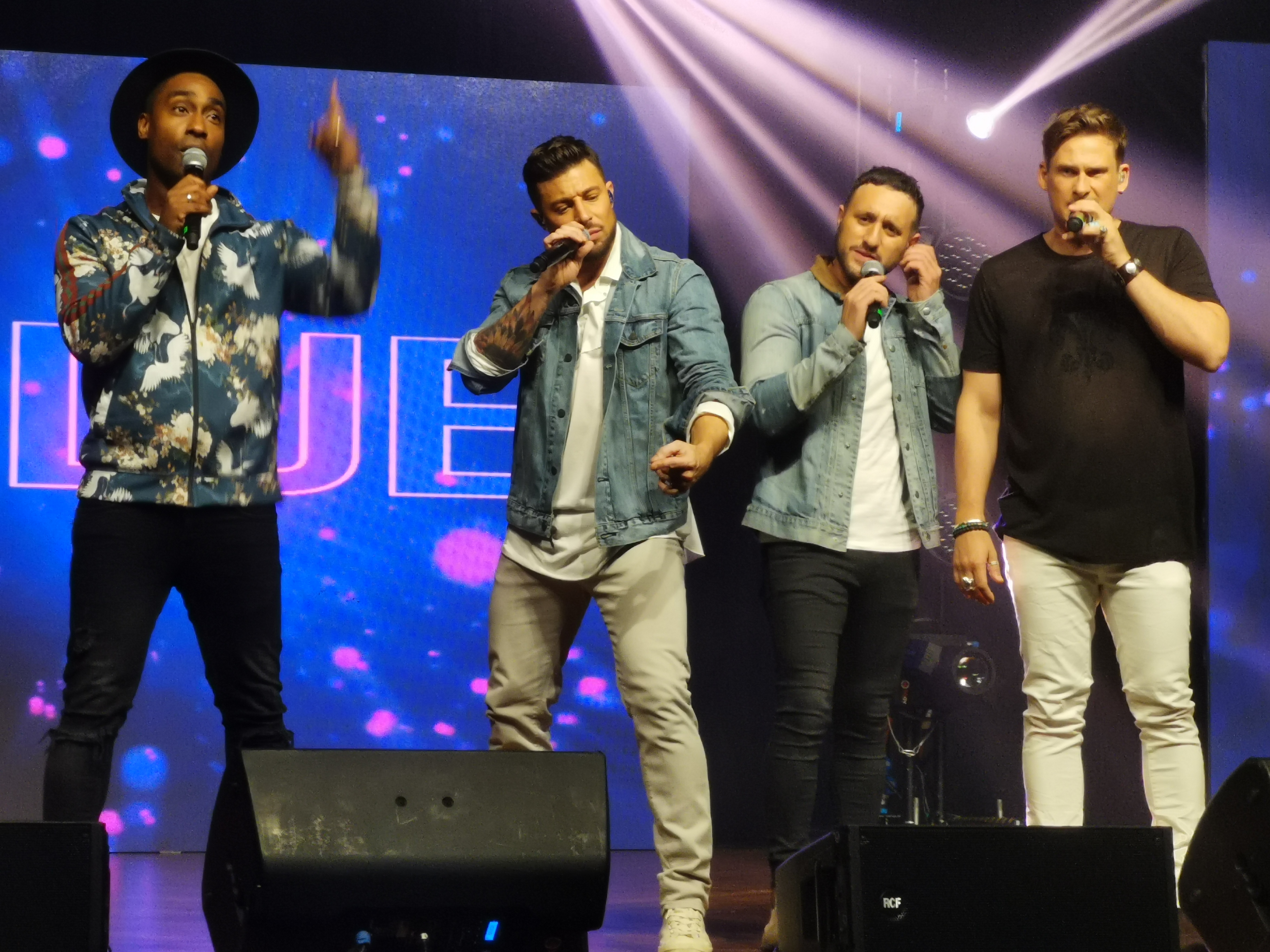 Diambil dengan telefon Huawei Mate Pro 20. Blue ketika sedang membuat persembahan langsung di Kuala Lumpur, Malaysia. Dari kiri Simon Webbe, Duncan James, Antony Costa, dan Lee Ryan.